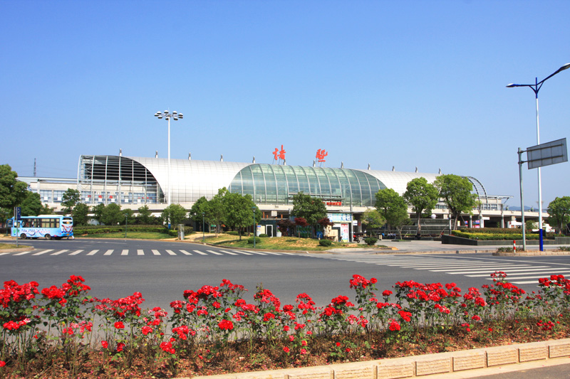 诸暨火车站